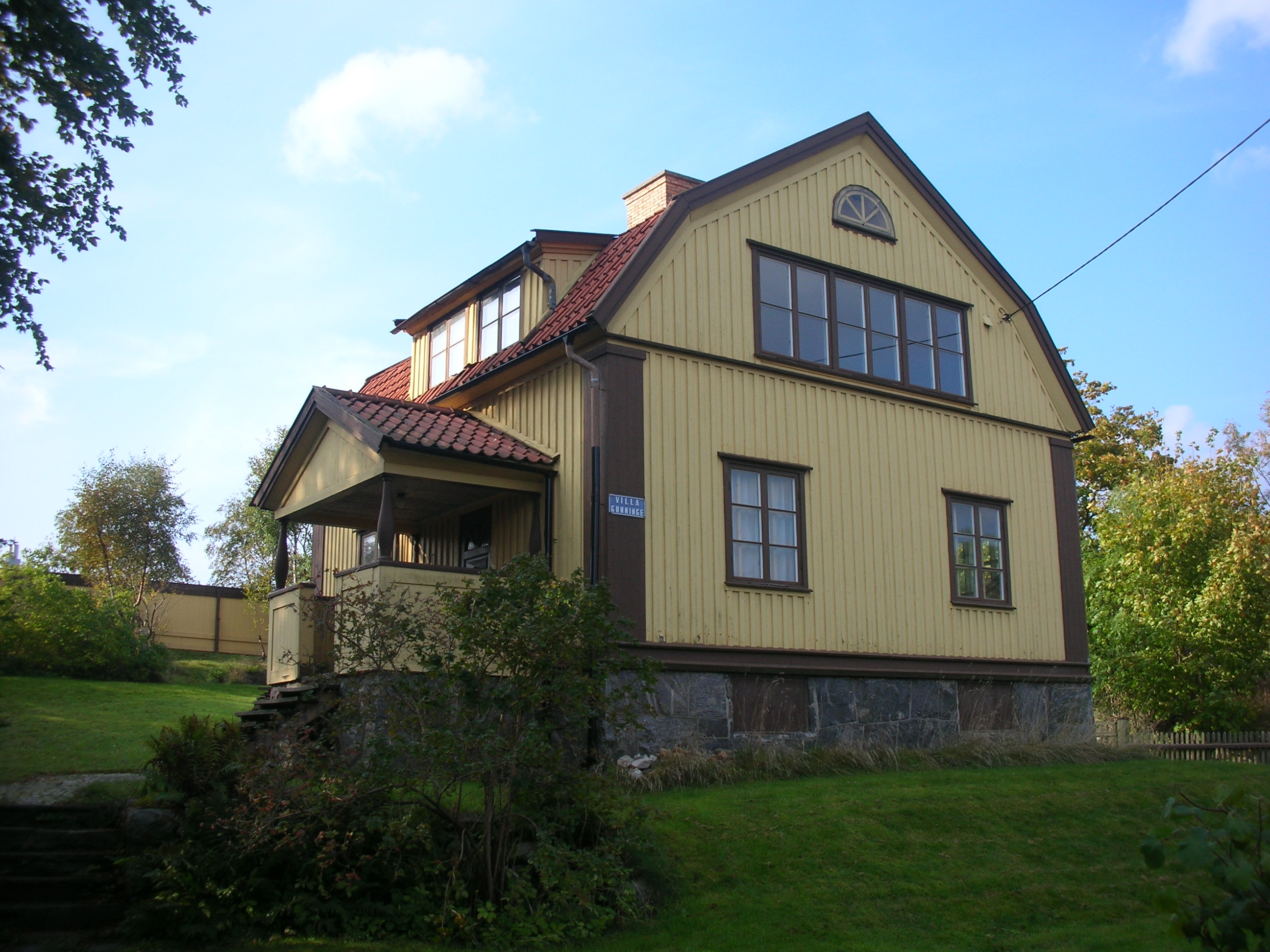 Villa Gunninge, färjenäs, Göteborg. Oktober, 2015.